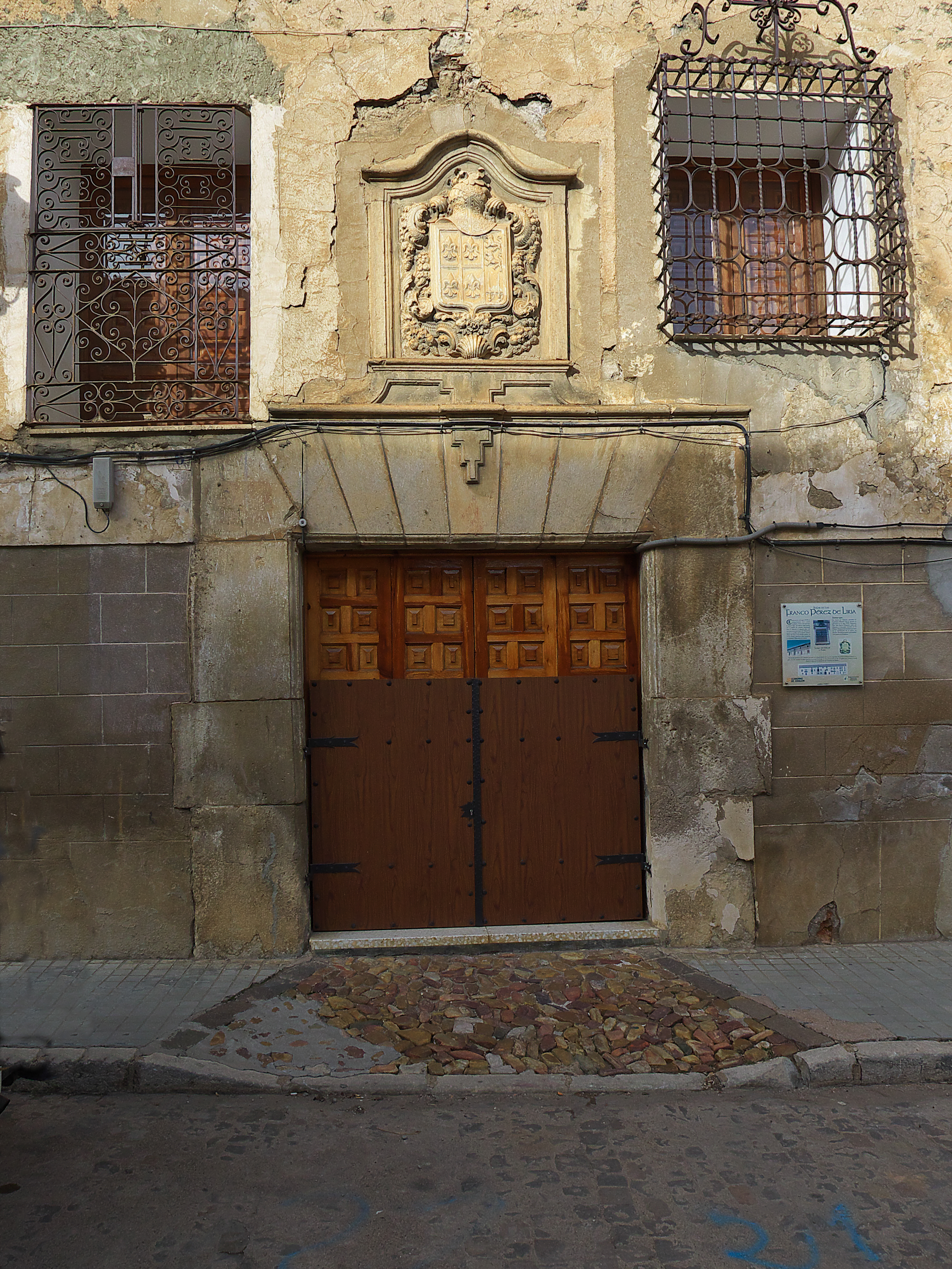 Portada de la casa de los nobles Franco Pérez de Liria (s. XVIII), principal familia de Orihuela. La rejería de esta casa es muy valiosa.